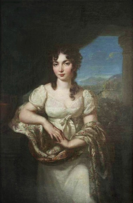 Варвара Ивановна Сафонова (1785—1810) в замужестве Потёмкина